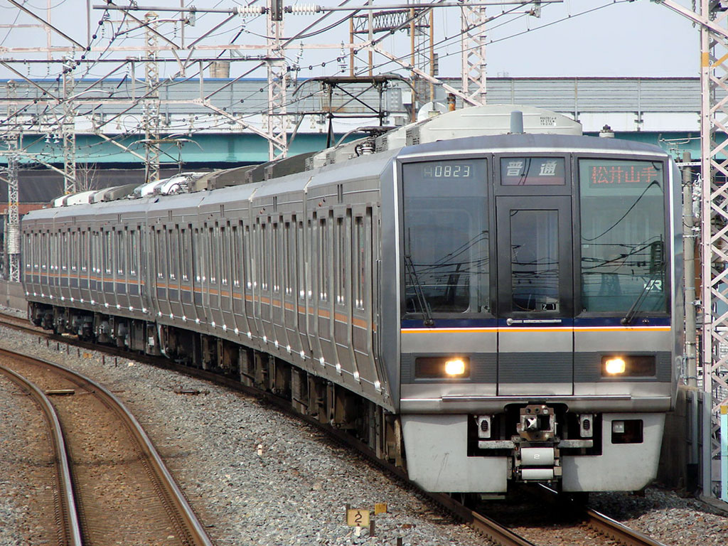 ＪＲ西日本 207系